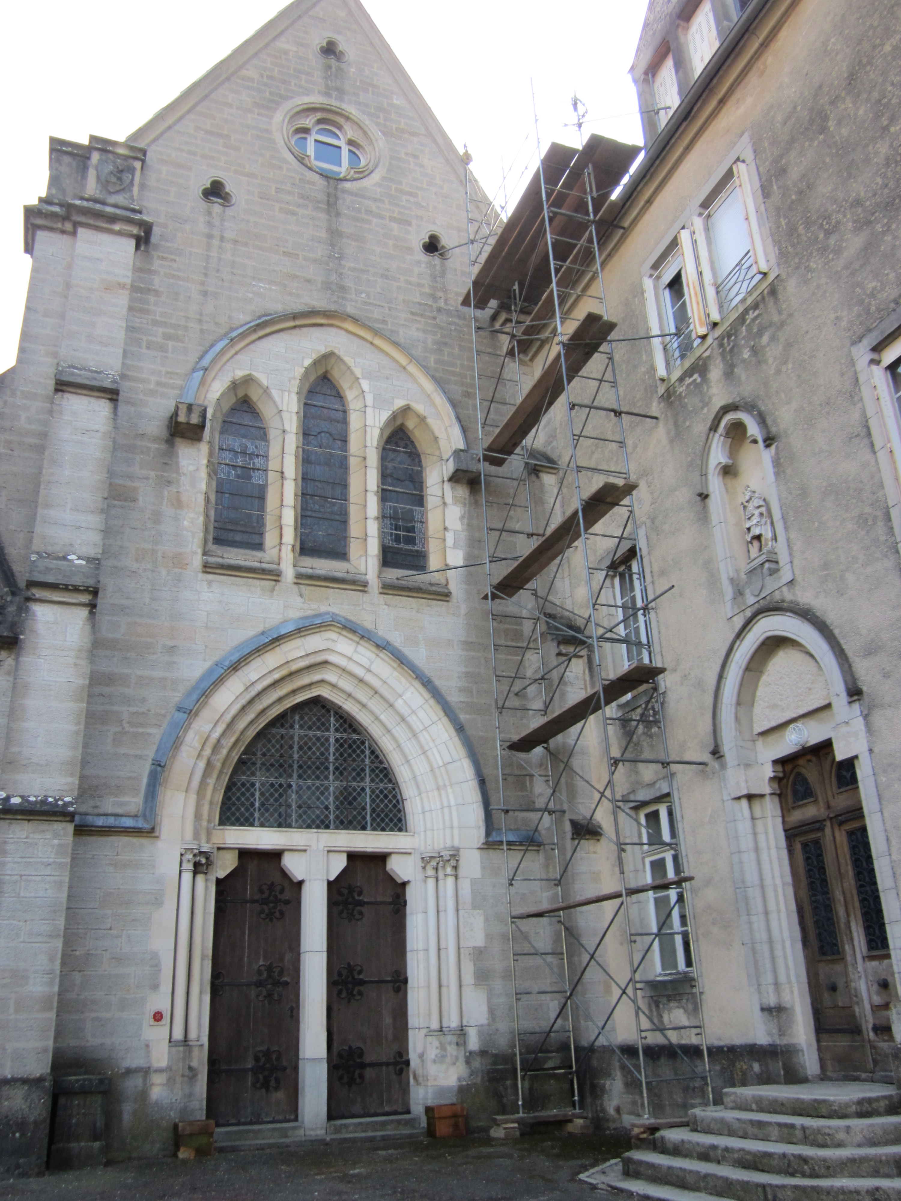 Vaux-sur-Poligny (Jura)- Façade de l'église reconstruite de 1863 à 1866